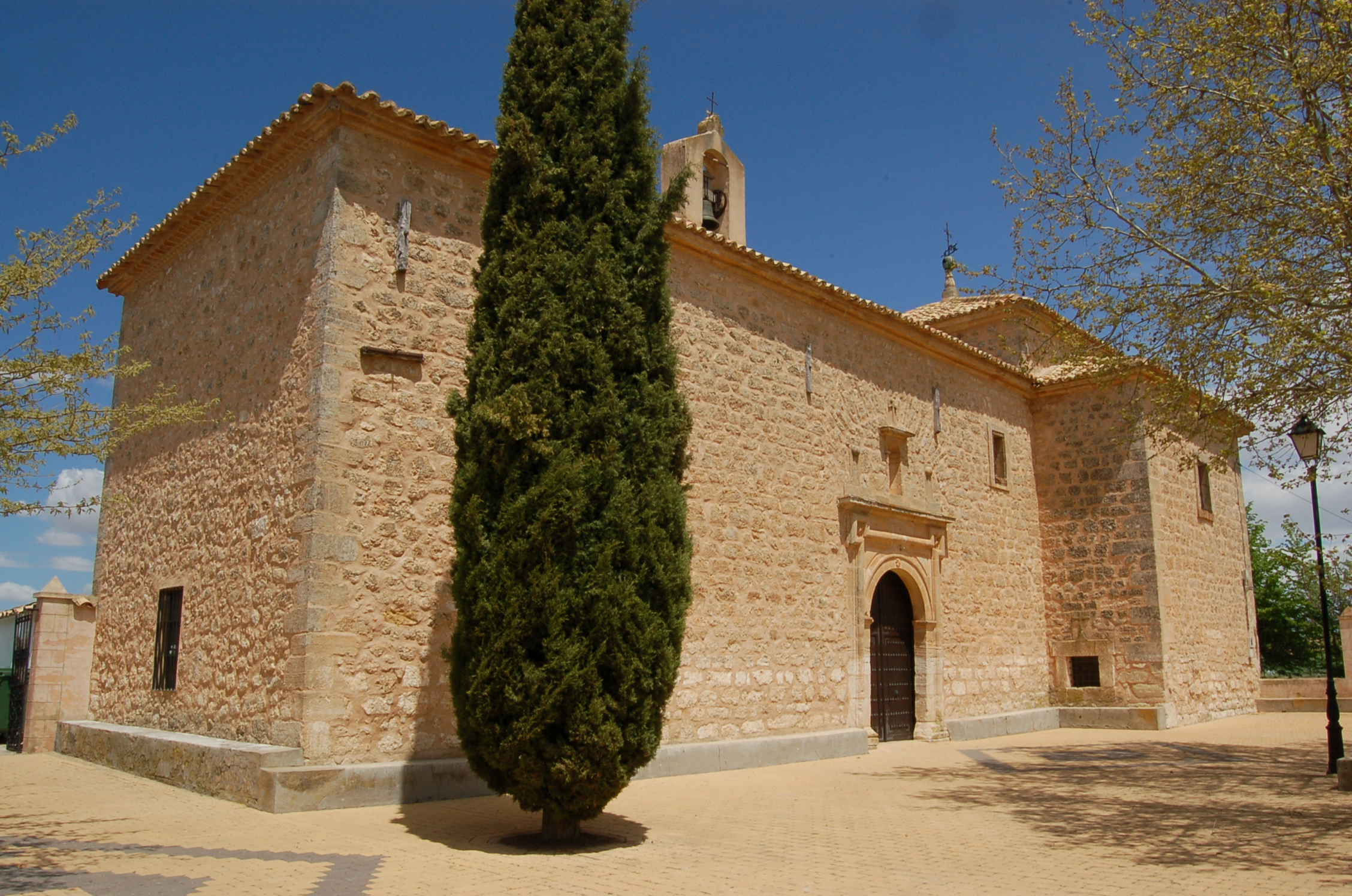 Igrexa de Villar de Cañas